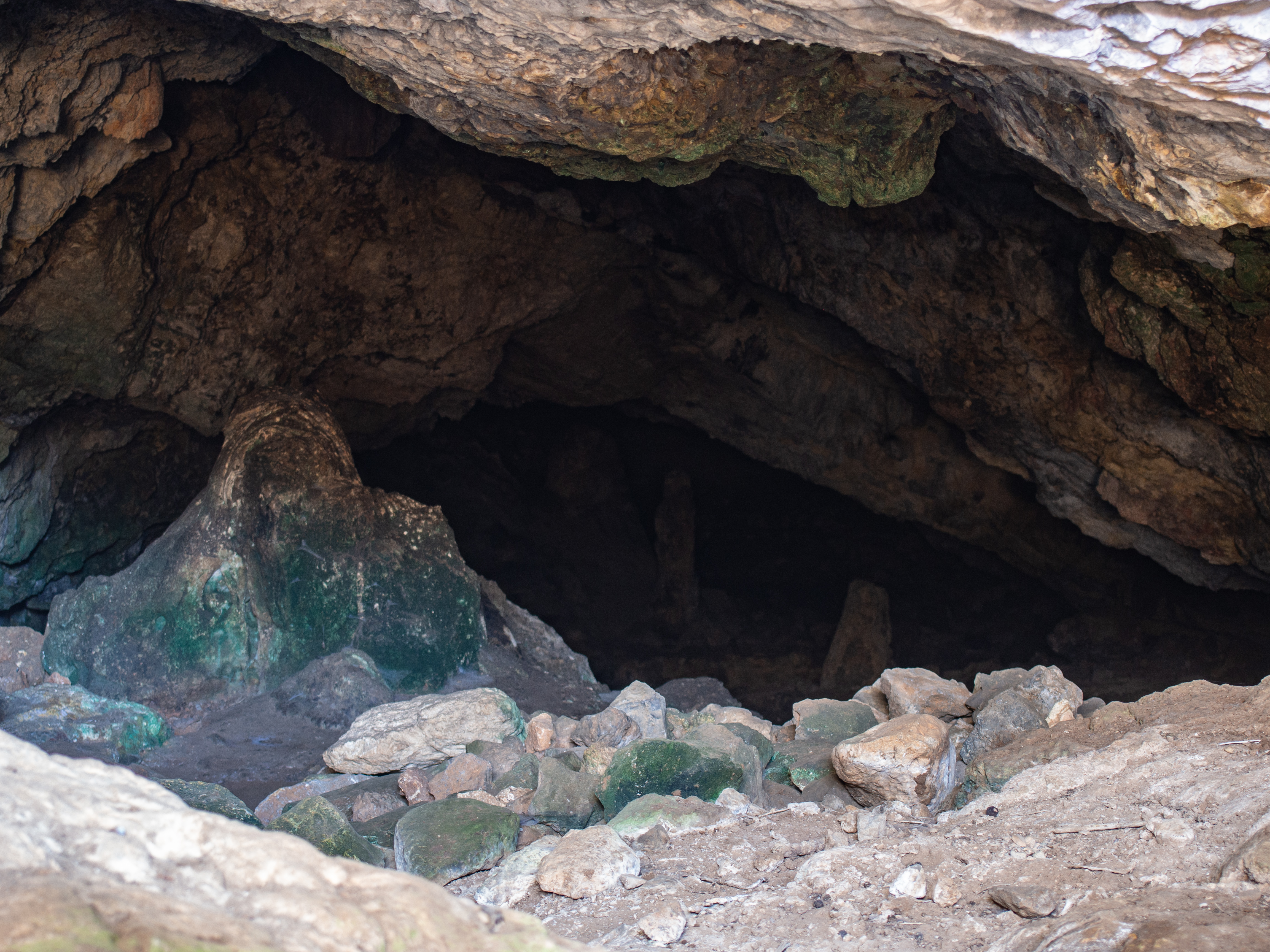 Σπήλαιο Ειλειθυίας - ιερό σπήλαιο αφιερωμένο στη θεότητα της γονιμότητας. Άποψη από την είσοδο.«Σπήλαιο Ειλειθυίας»